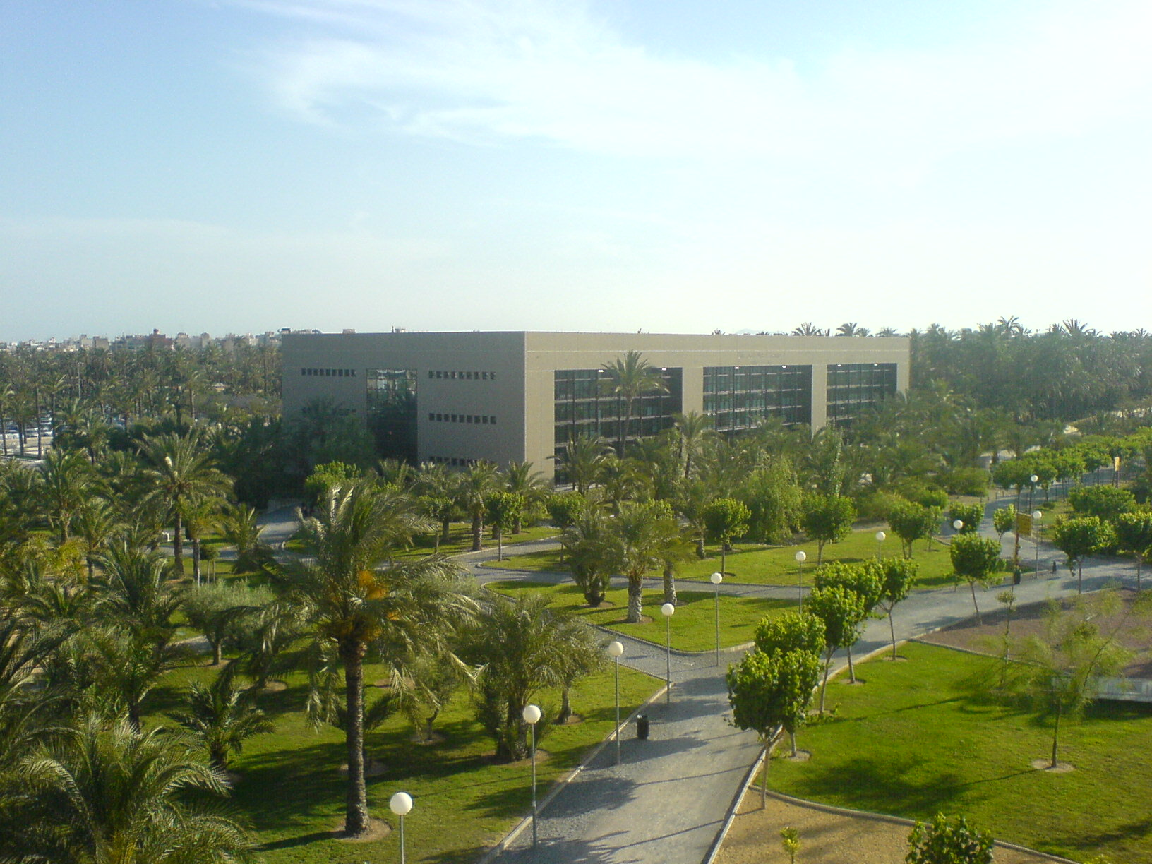 Campus de la Universidad Miguel Hernández en Elche, Alicante, España.